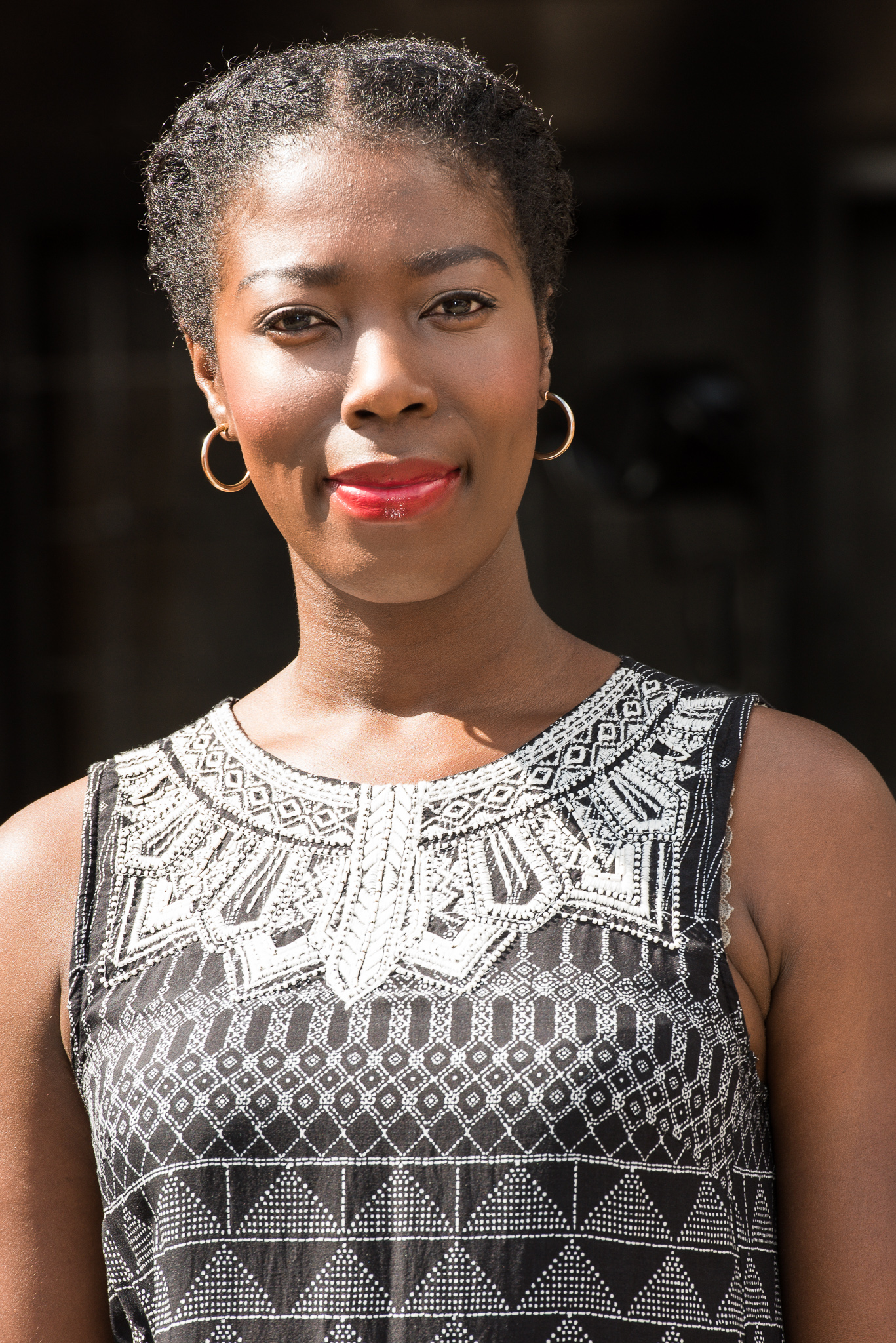 Am Ende geht man nackt,BR,Bayerischer Rundfunk,Dayan Kodua,Franken-Tatort,Tatort